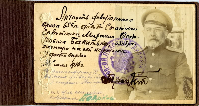 Удостоверение личности дивизионного врача 65 пехотной дивизии статского советника Михаила Фёдоровича Бакитько